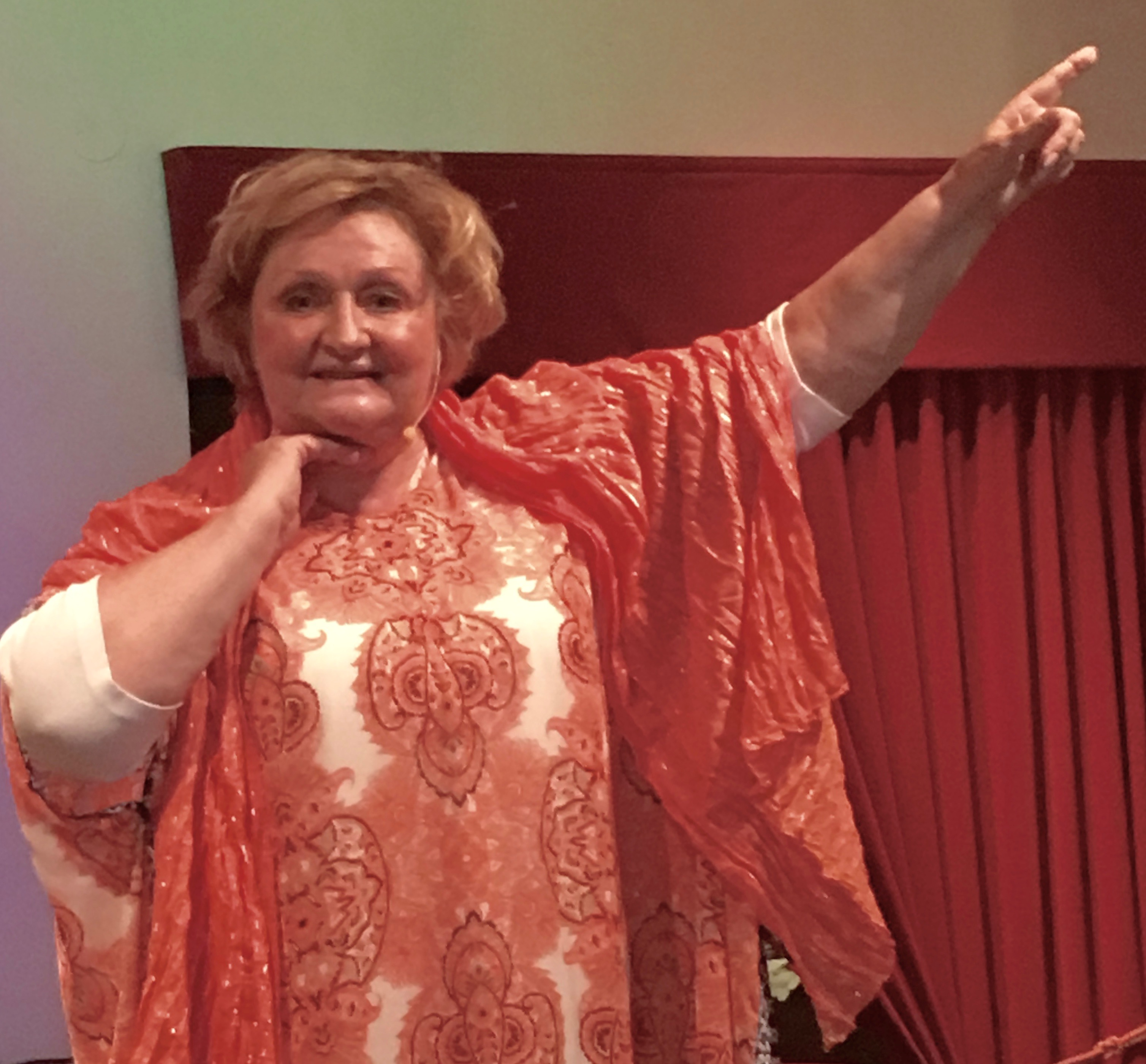 Marianne Mörck, född 2 september 1949 i Göteborg, är en svensk skådespelare, sångare och regissör.